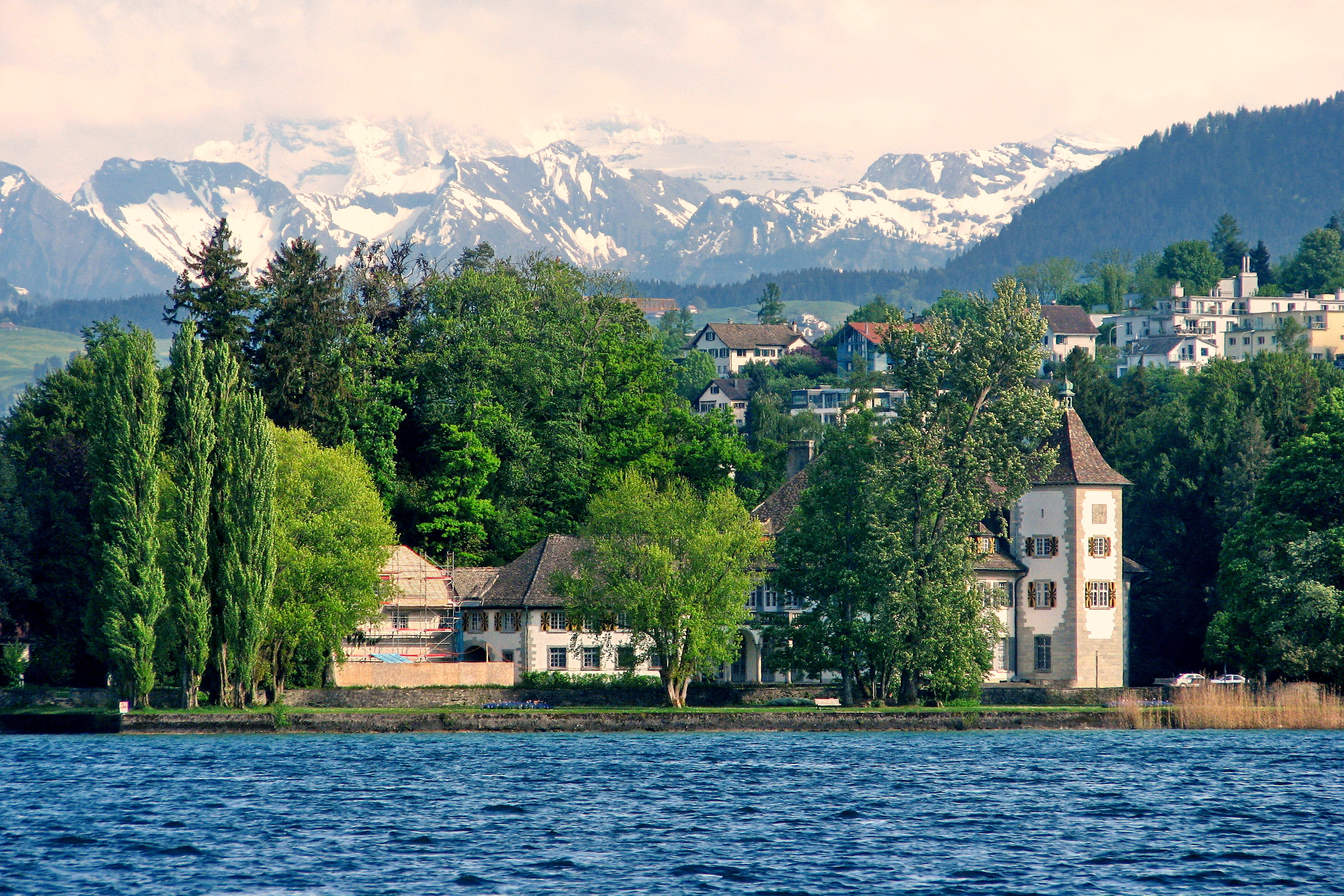 Schloss Au (Werdmüller estate) on Halbinsel Au (Switzerland)